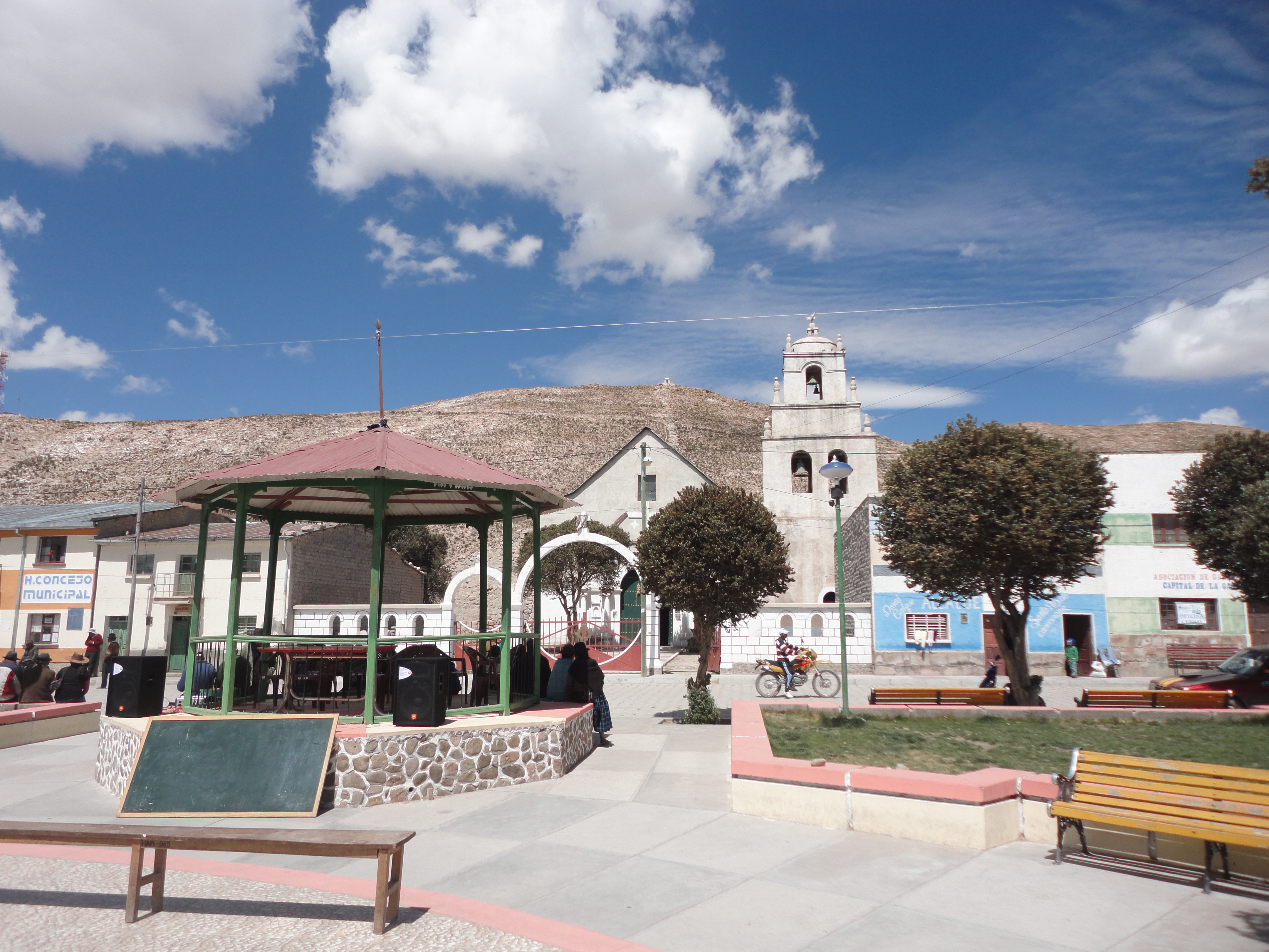 plaza 29 de junio